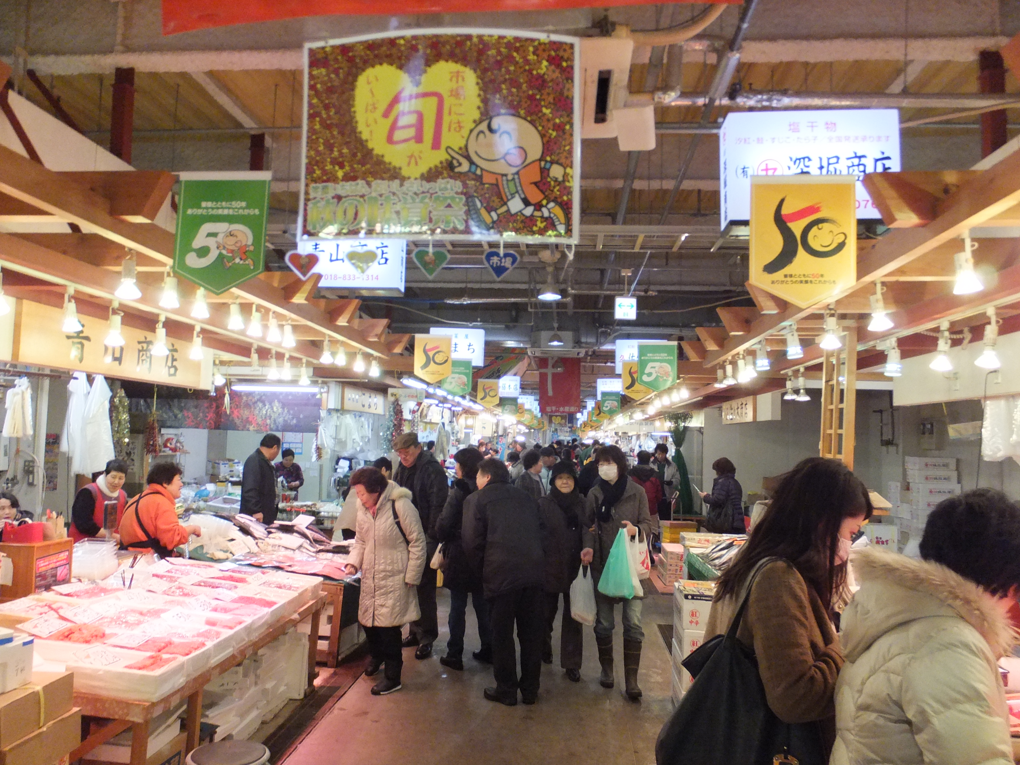 年の瀬の秋田市民市場。買い物客で賑わう。